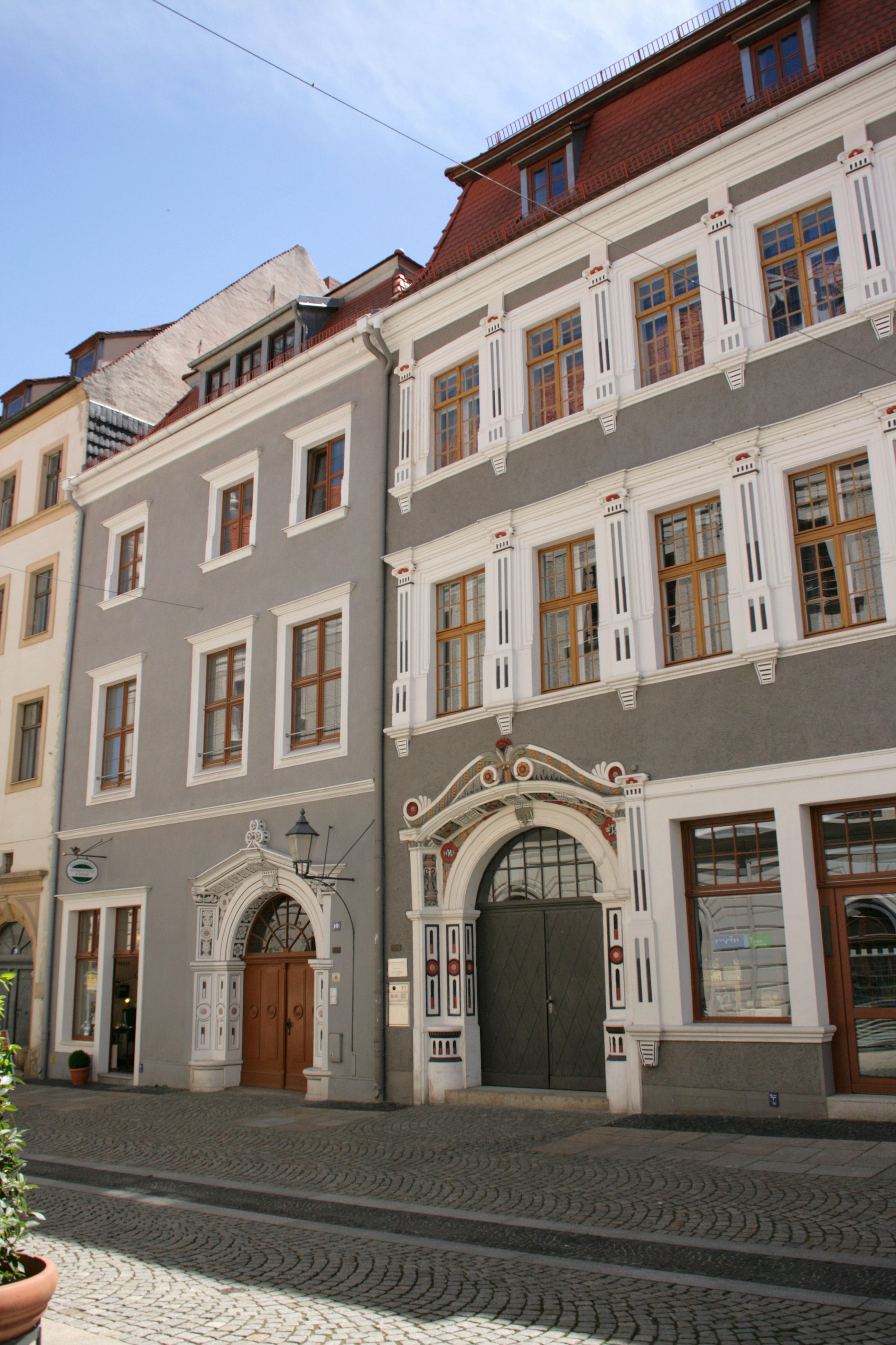 Brüderstraße 10 + 11 in Görlitz